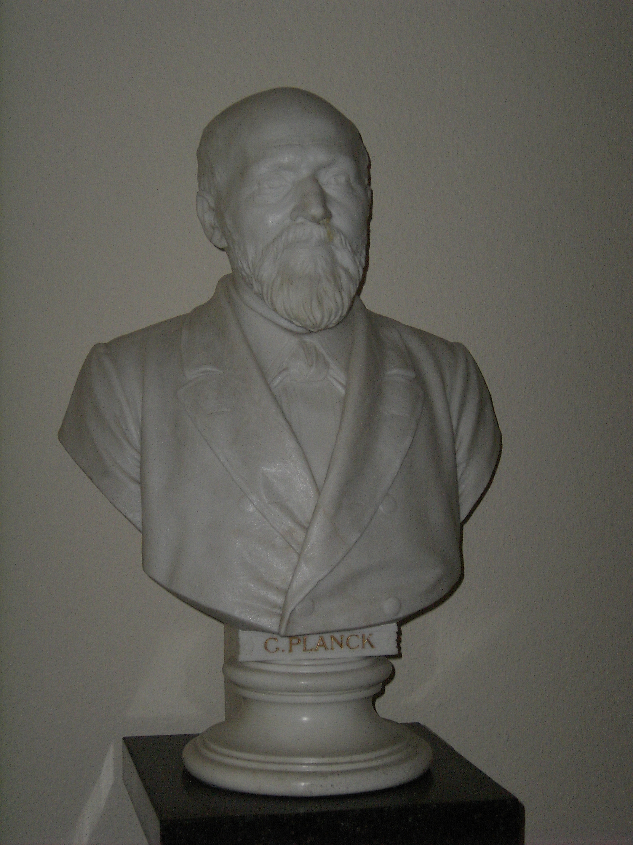 Büste des Juristen Gottlieb Planck (1824-1907), Onkel des Max Planck. Die Büste wurde 1901 von Carl Ferdinand Hartzer (1838-1906) geschaffen.